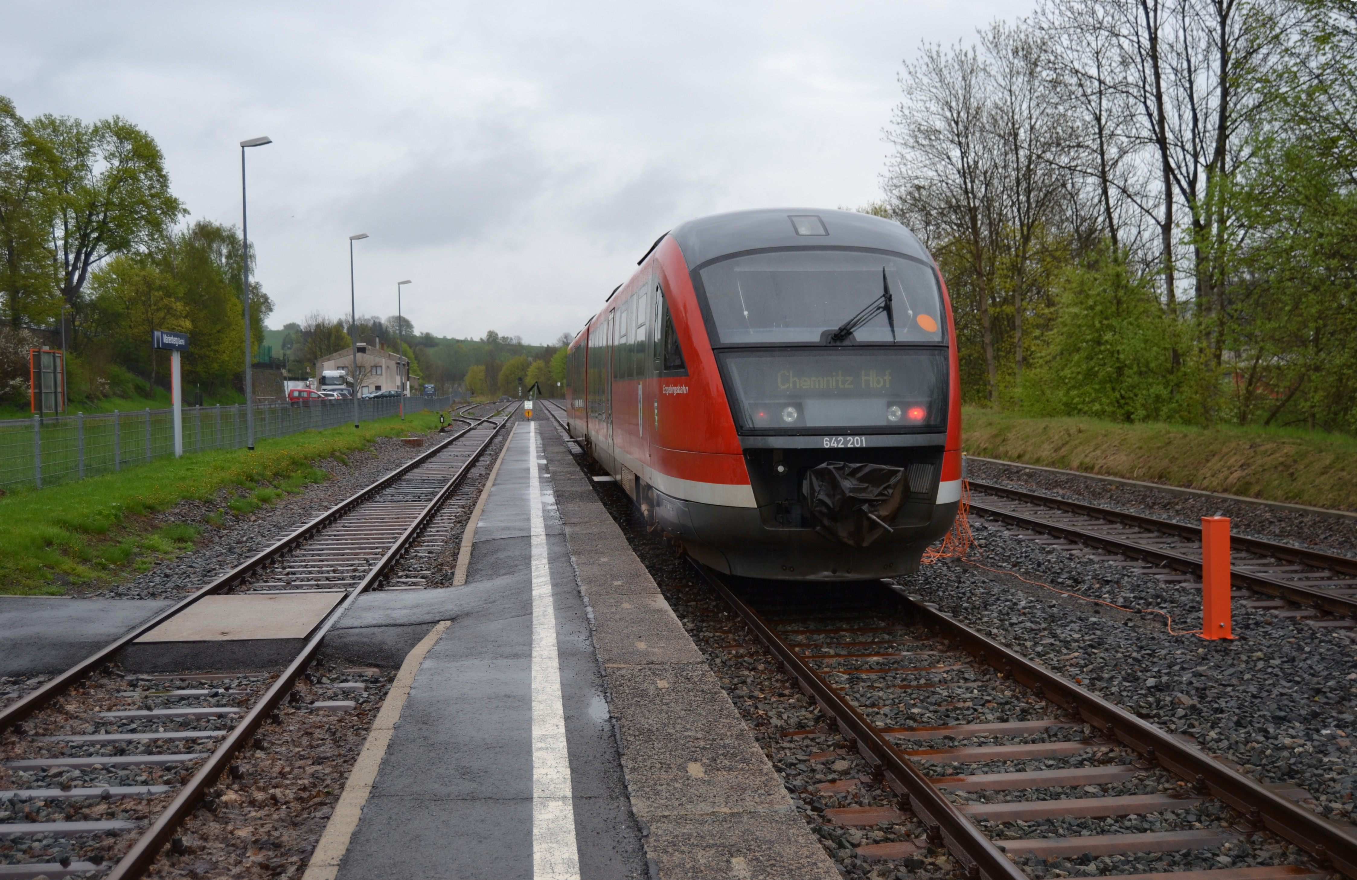 abfahrbereiter Triebwagen BR 642 der Erzgebirgsbahn im Bahnhof Marienberg an der Bahnstrecke Reitzenhain–Flöha